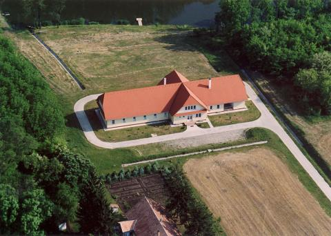 Kiszékely, Hungary, aerialphotography